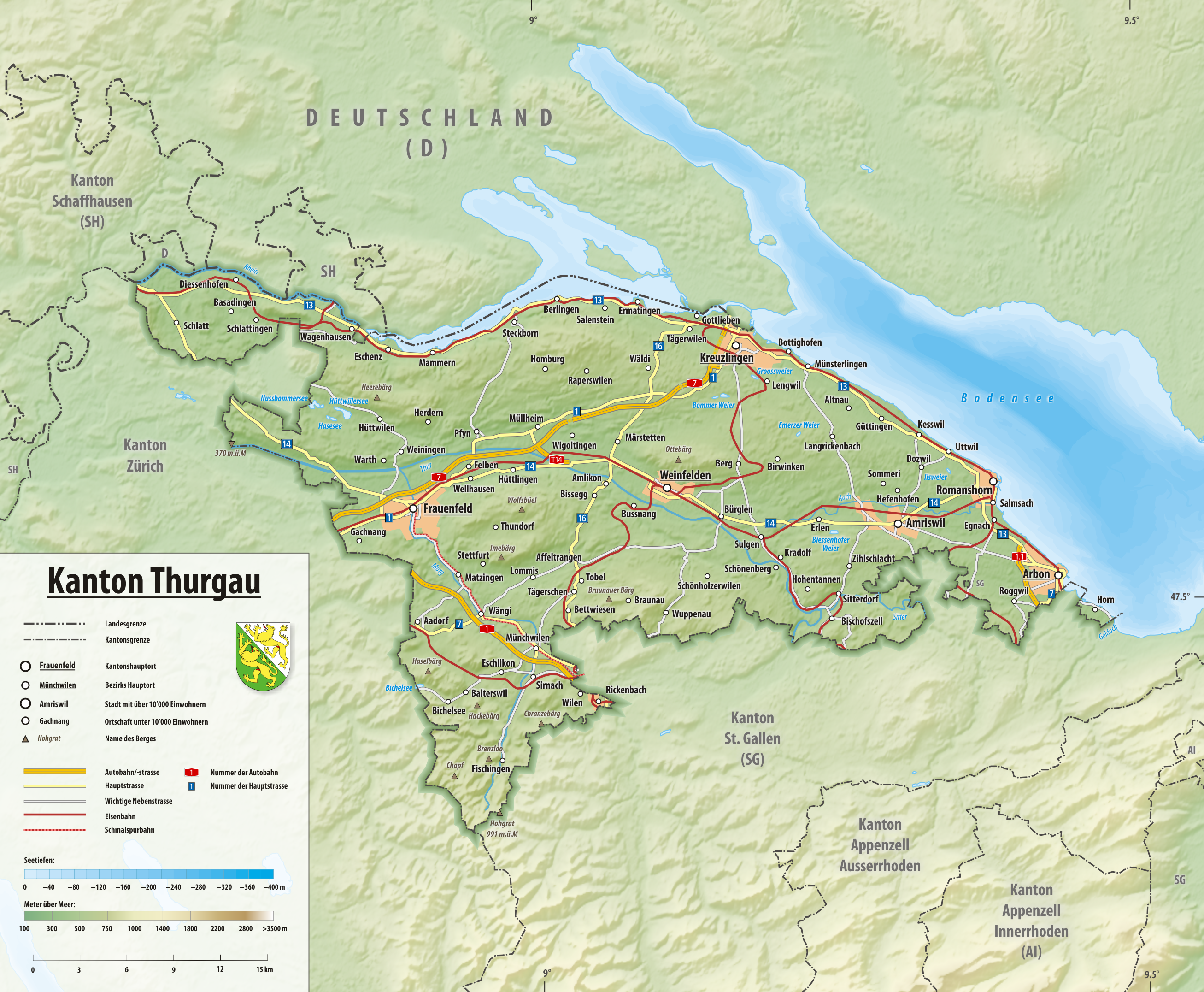 Reliefkarte des Kantons Thurgau Topographischer Hintergrund: NASA Shuttle Radar Topography Mission (public domain). SRTM3 v.2.